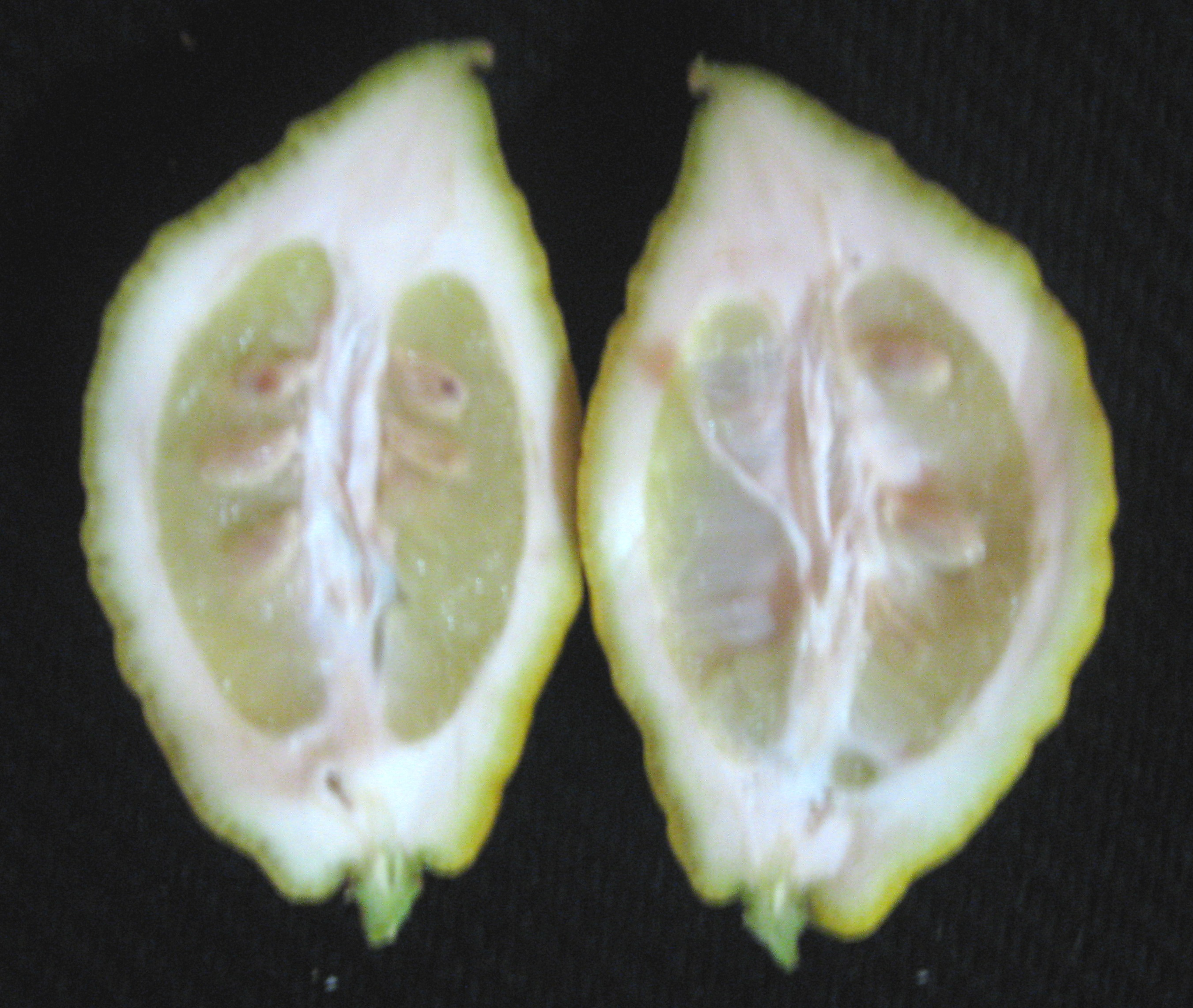 cross section in kibilevitz citron